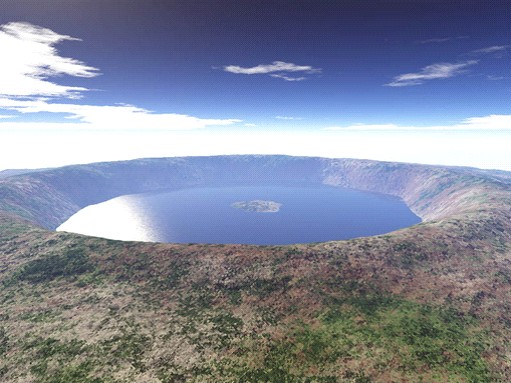 Astroblème de Rochechouart-Chassenon, dont la formation remonte a 214 millions d'années environ. Image de synthèse réalisée avec Terragen représentant la forme de l'Astroblème de Rochechouart-Chassenon, quelques années après l'impact. La nature commence à reprendre ses droits, le cratère est rempli d'eau. La forme et les dimensions les plus probables du cratère ont été utilisées pour le calcul de cette image.